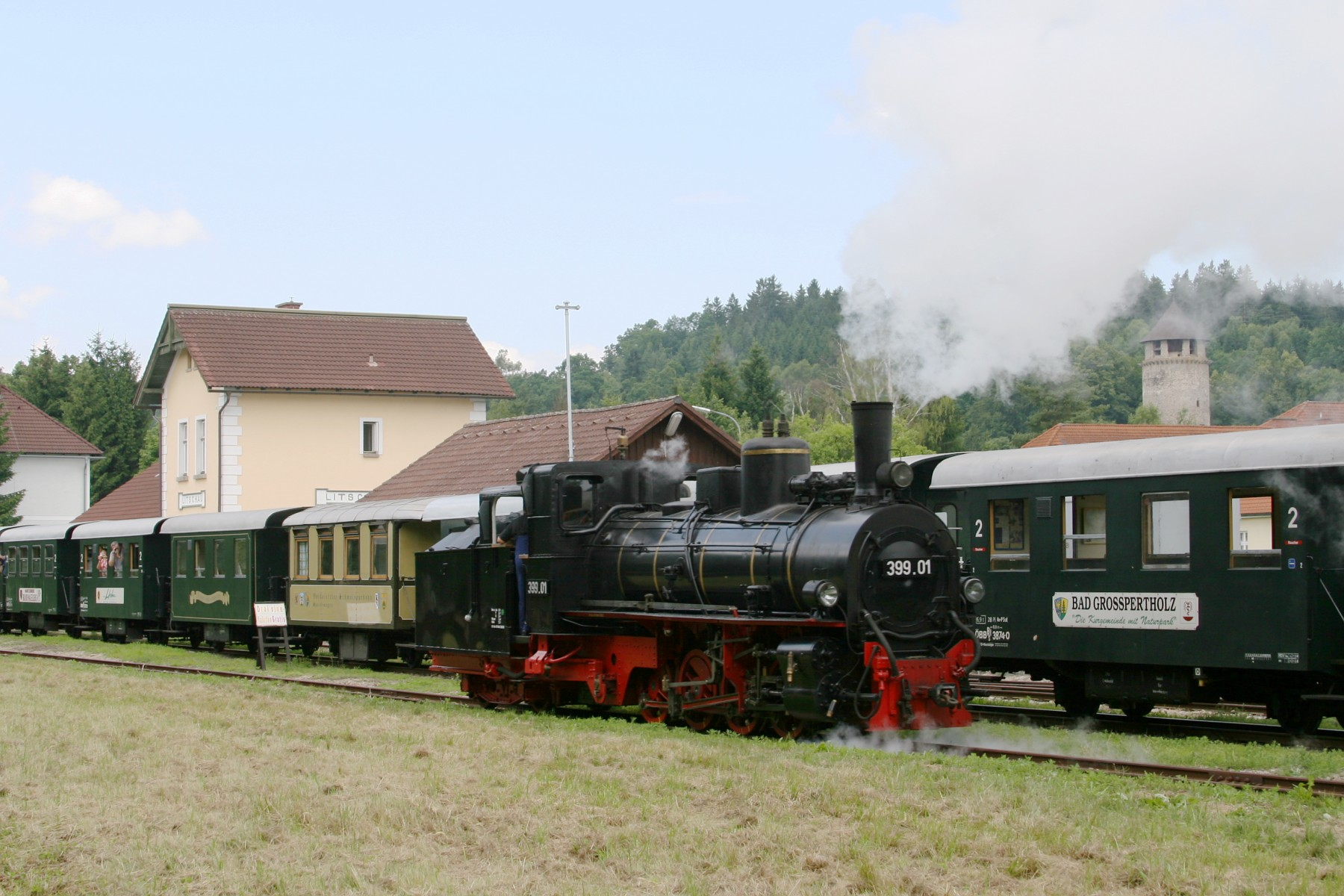 en: ÖBB 399.01 shunting around train in Litschau on the Waldviertel Narrow Gauge Railways in Lower Austria de: ÖBB 399.01 beim Umsetzen in Litschau an den Waldviertler Schmalspurbahnen in Niederösterreich.